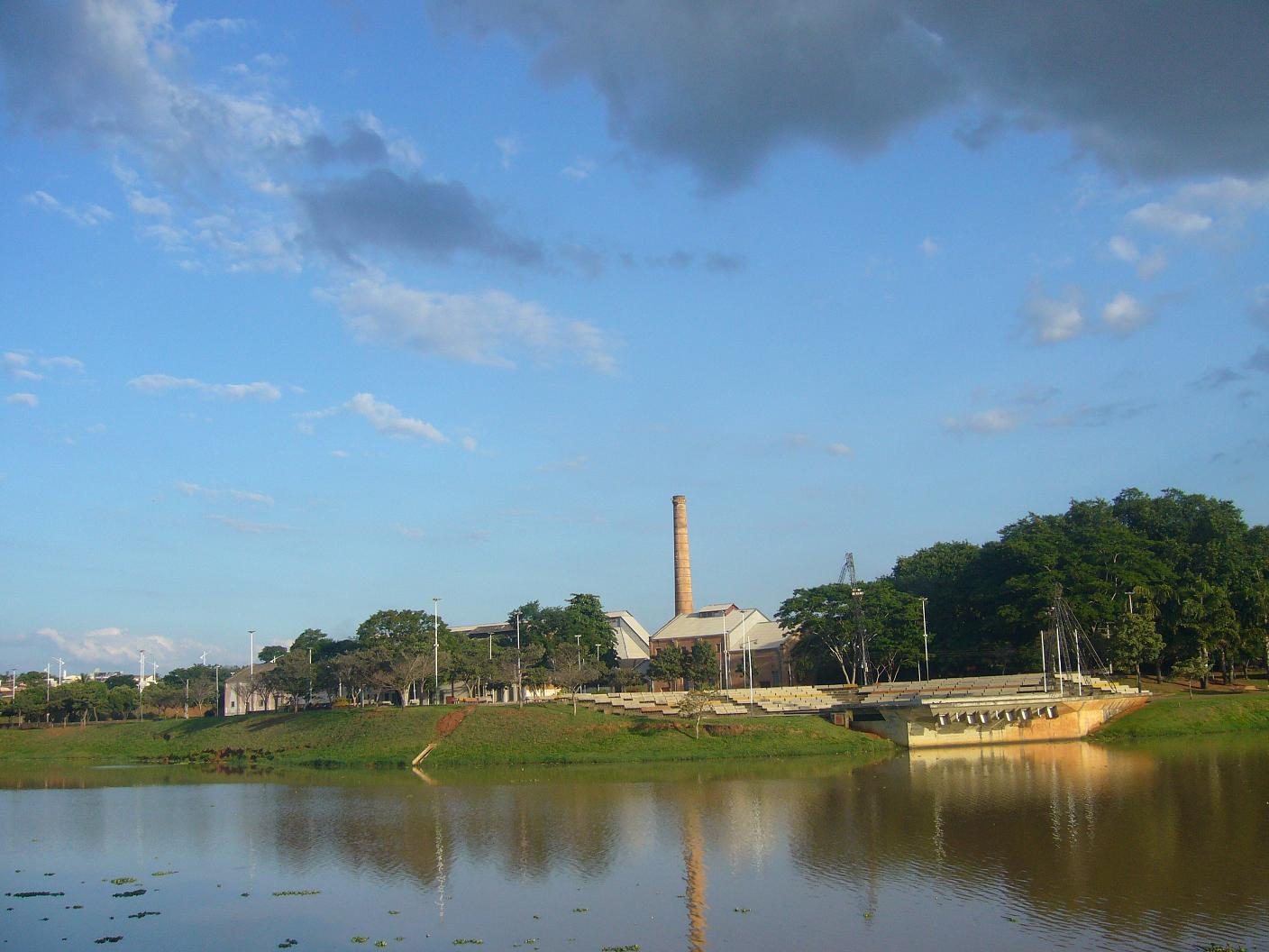 Antiga fábrica na represa de São José do Rio Preto - SP, BRASIL